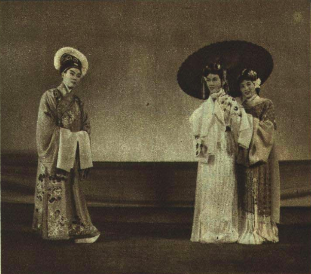 1952 越剧 白蛇传